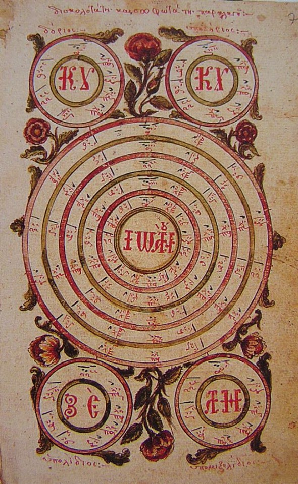 Troho muzikore e Joan Kukuzelit, nga Kodiku 951, viti 1670, Manastiri Iviron, Mali i Shenjtë (Athos).